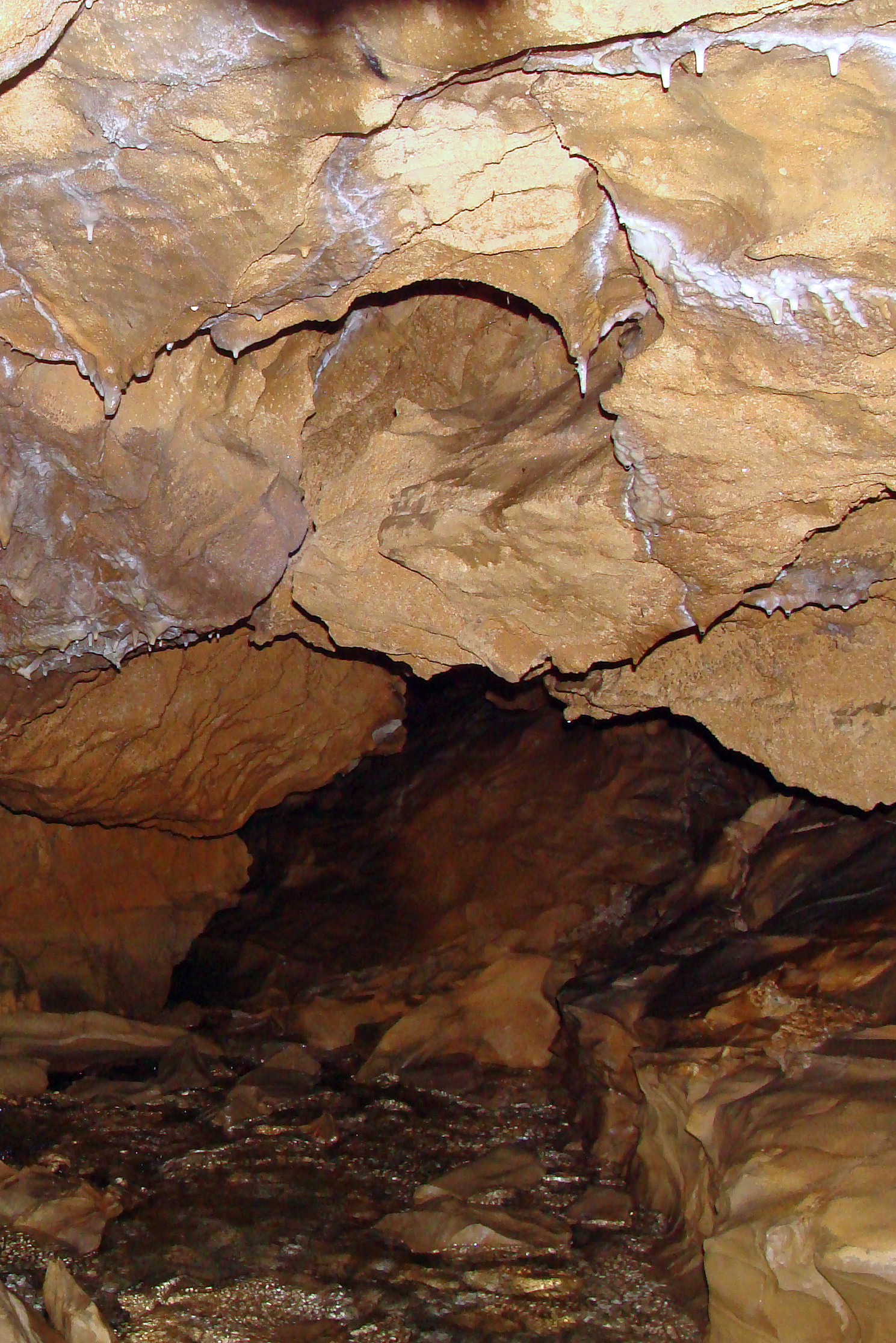 Résurgence de Pod Lanisce, située près de Monteaperta, commune de Taipana (Frioul-Vénétie julienne) en Italie.